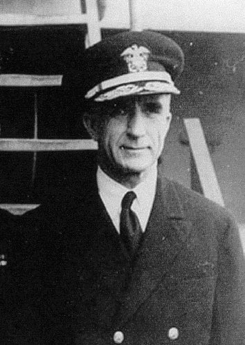 Morton Lyndholm Deyo